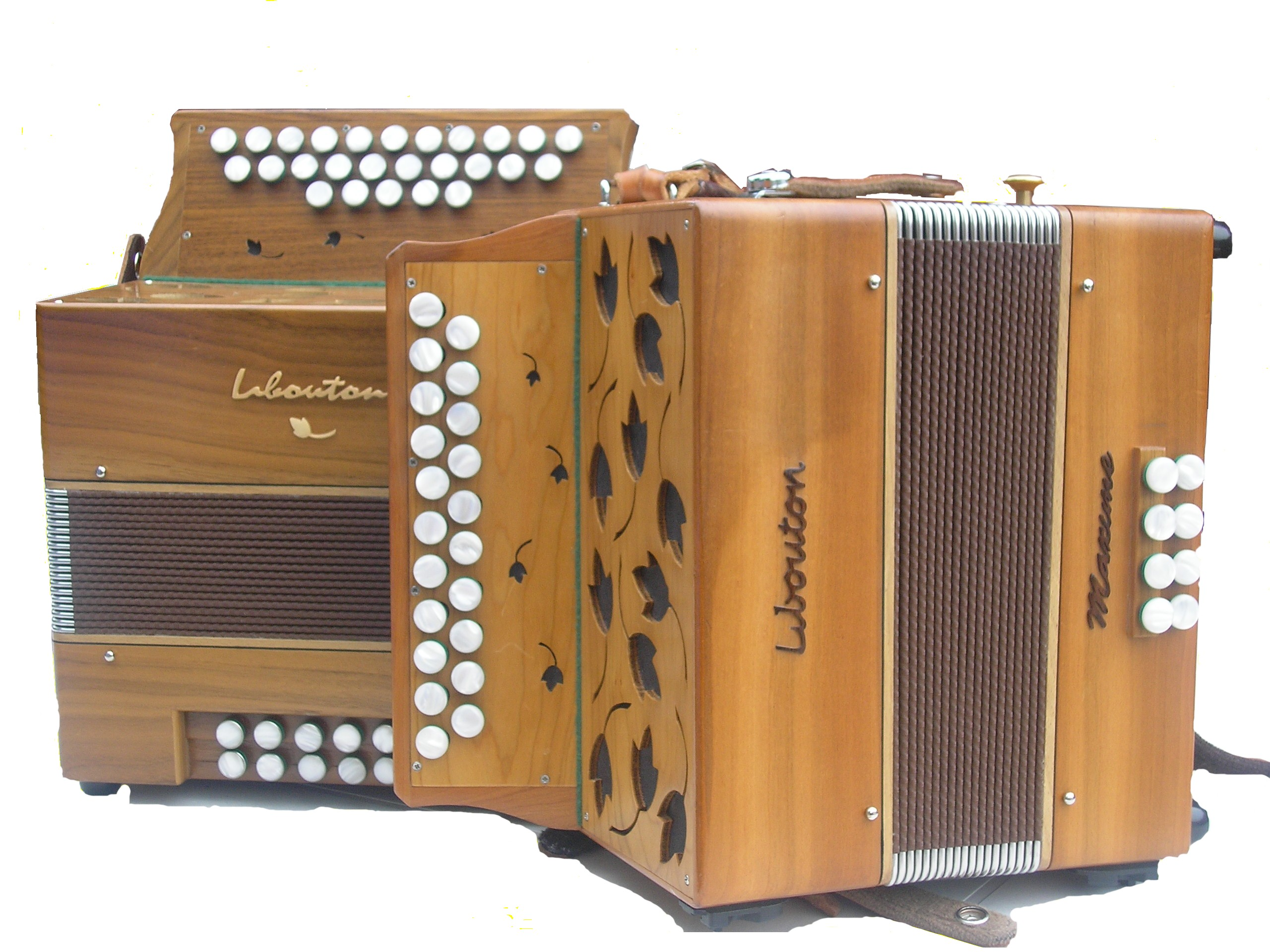 deux accordéons diatonique